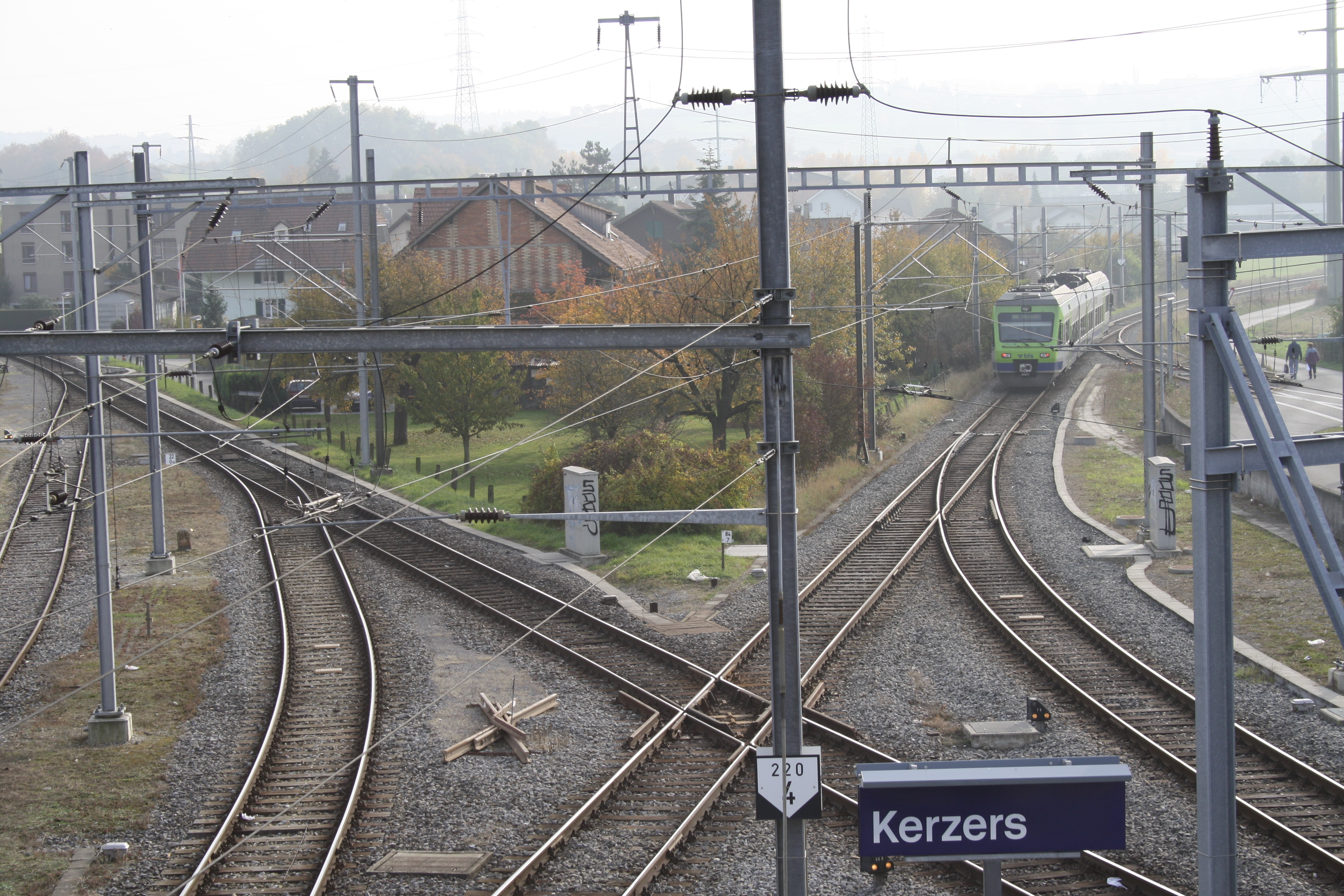 Streckenkreuzung Kerzers mit S-Bahn-Zug nach Murten